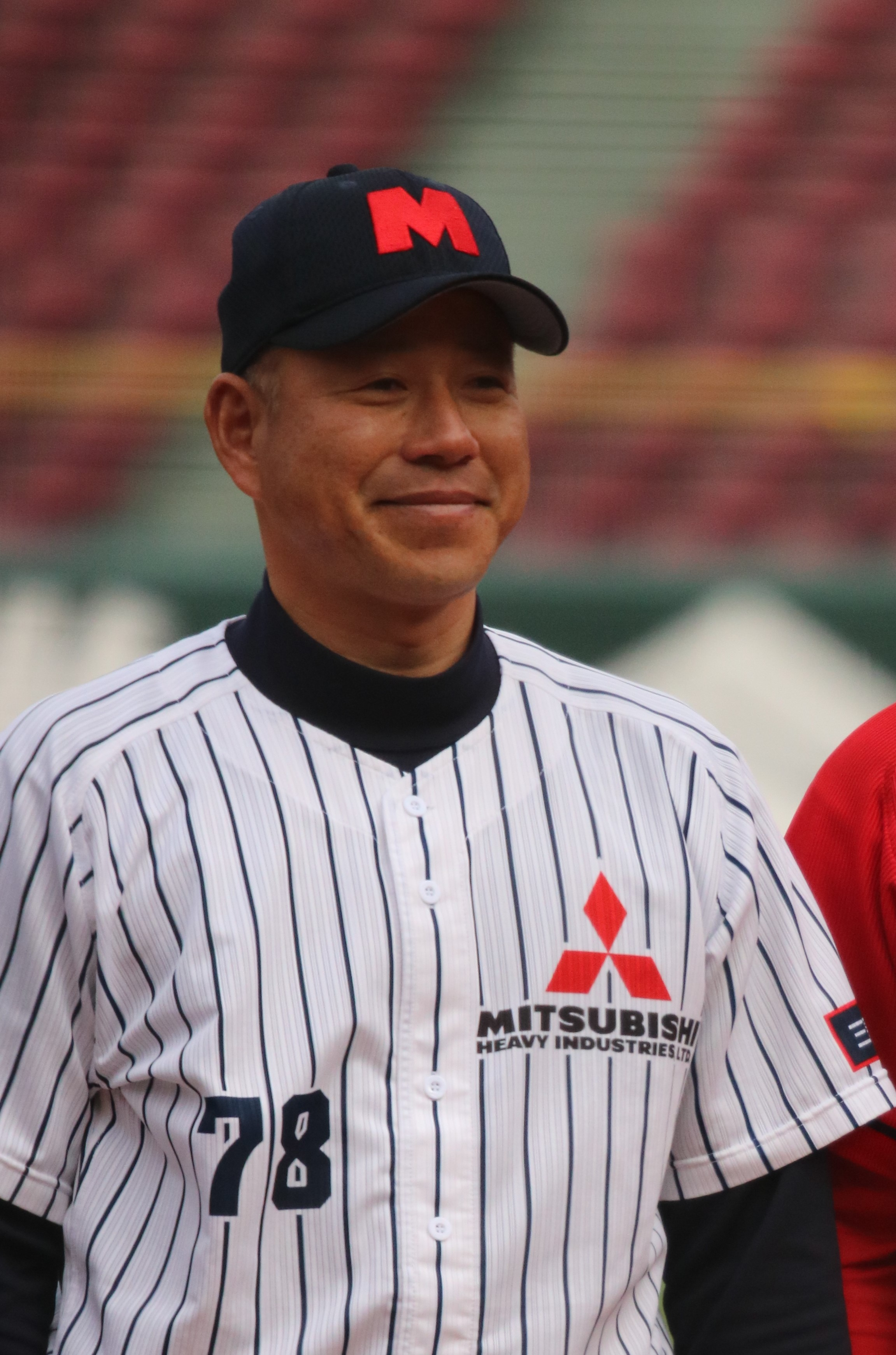 2018年3月7日 社会人オール広島 vs 広島東洋カープ